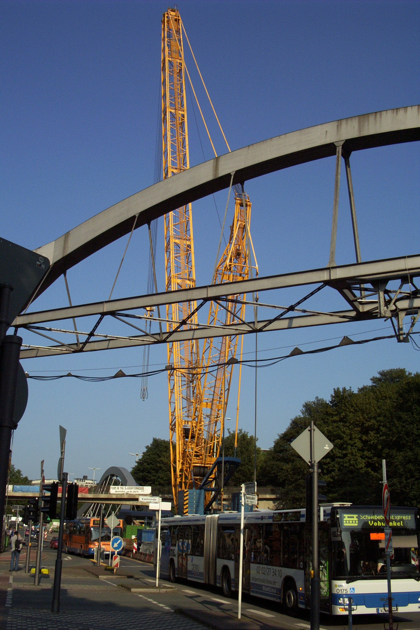 Bundesallee, Wuppertal